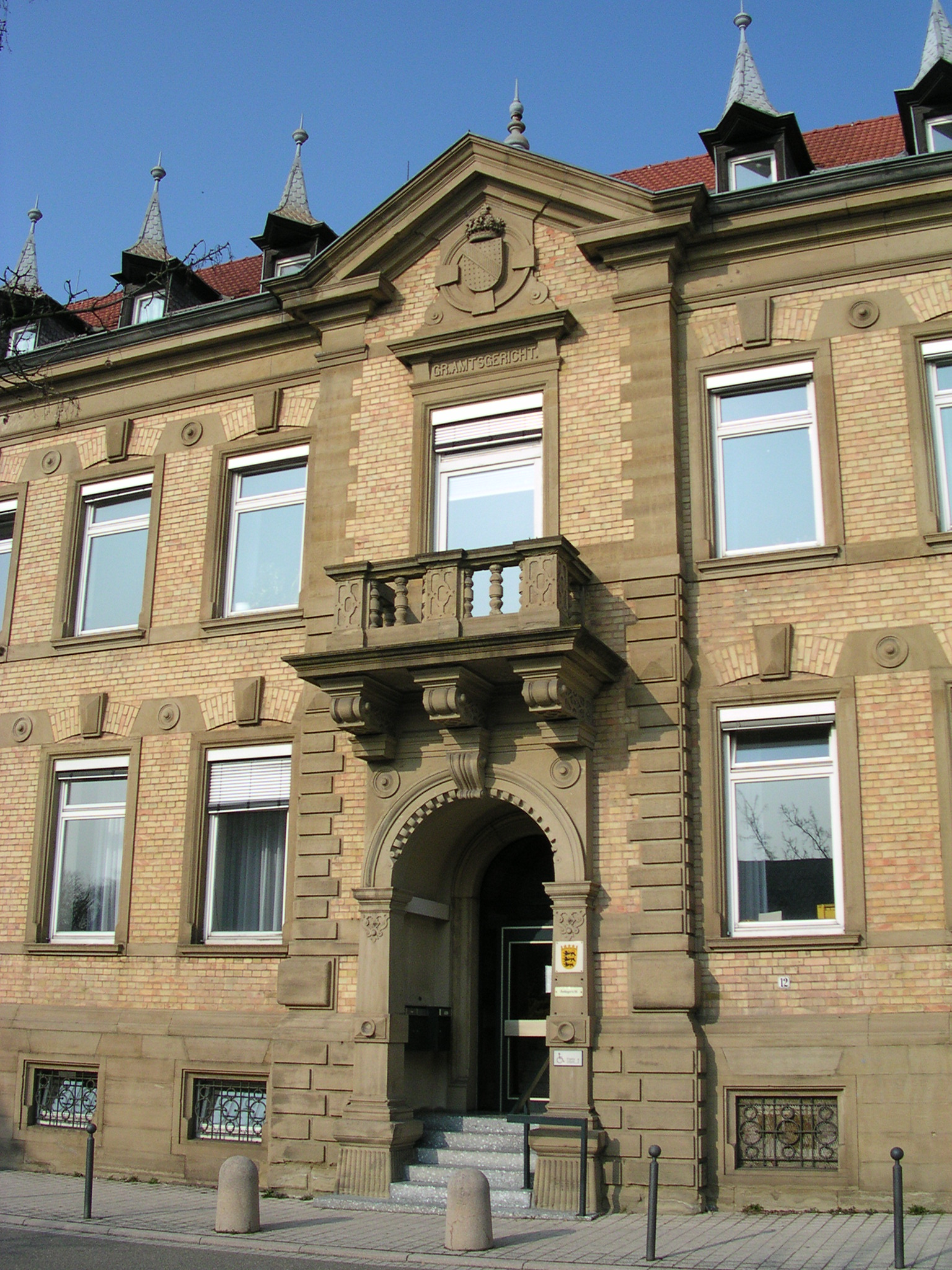 Von 1894 bis 1996 baute man an der Werderstraße das ehemals großherzoglich-badische Amtsgericht. Architekt war Julius Koch, Vorstand der Bezirksbauinspektion Heidelberg. Fassade mit Steinmetzarbeiten und schmuckreichen Giebeln, Landeswappen mit Krone.